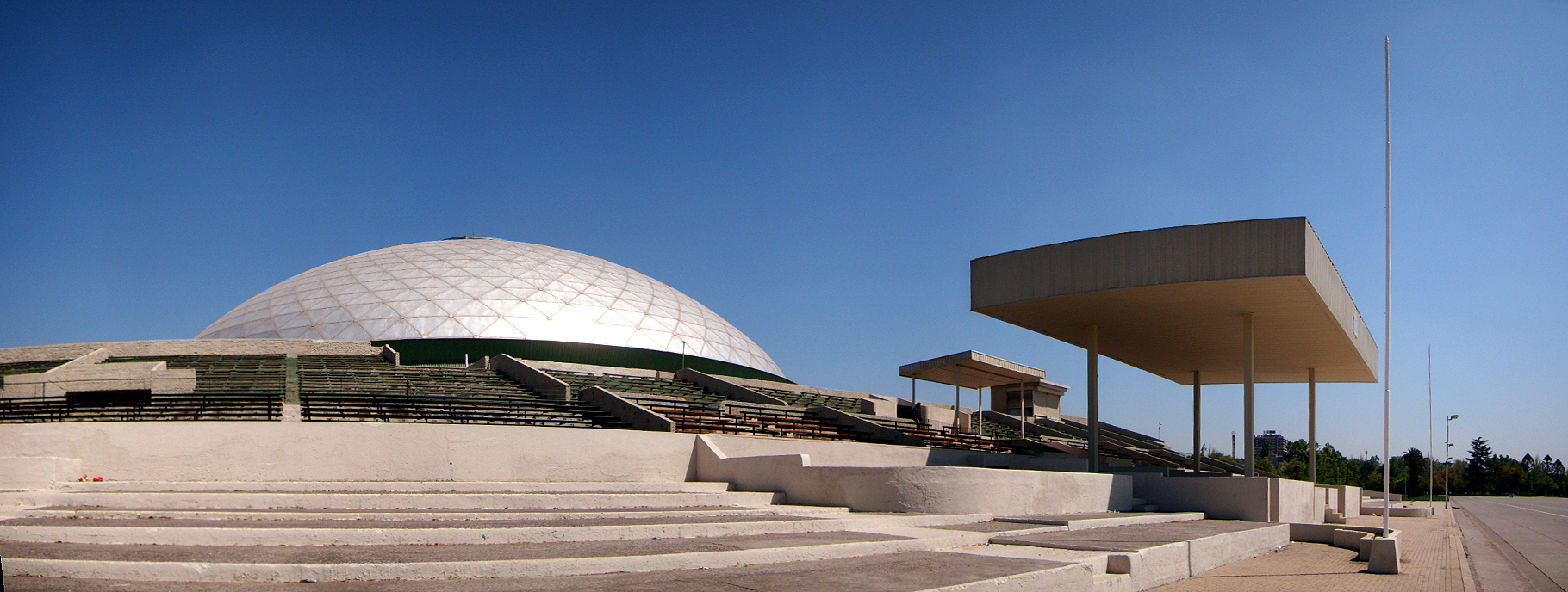 Las gradas en la elipse del Parque O'Higgins -ubicado en Santiago de Chile- a un costado del Movistar Arena (domo blanco).